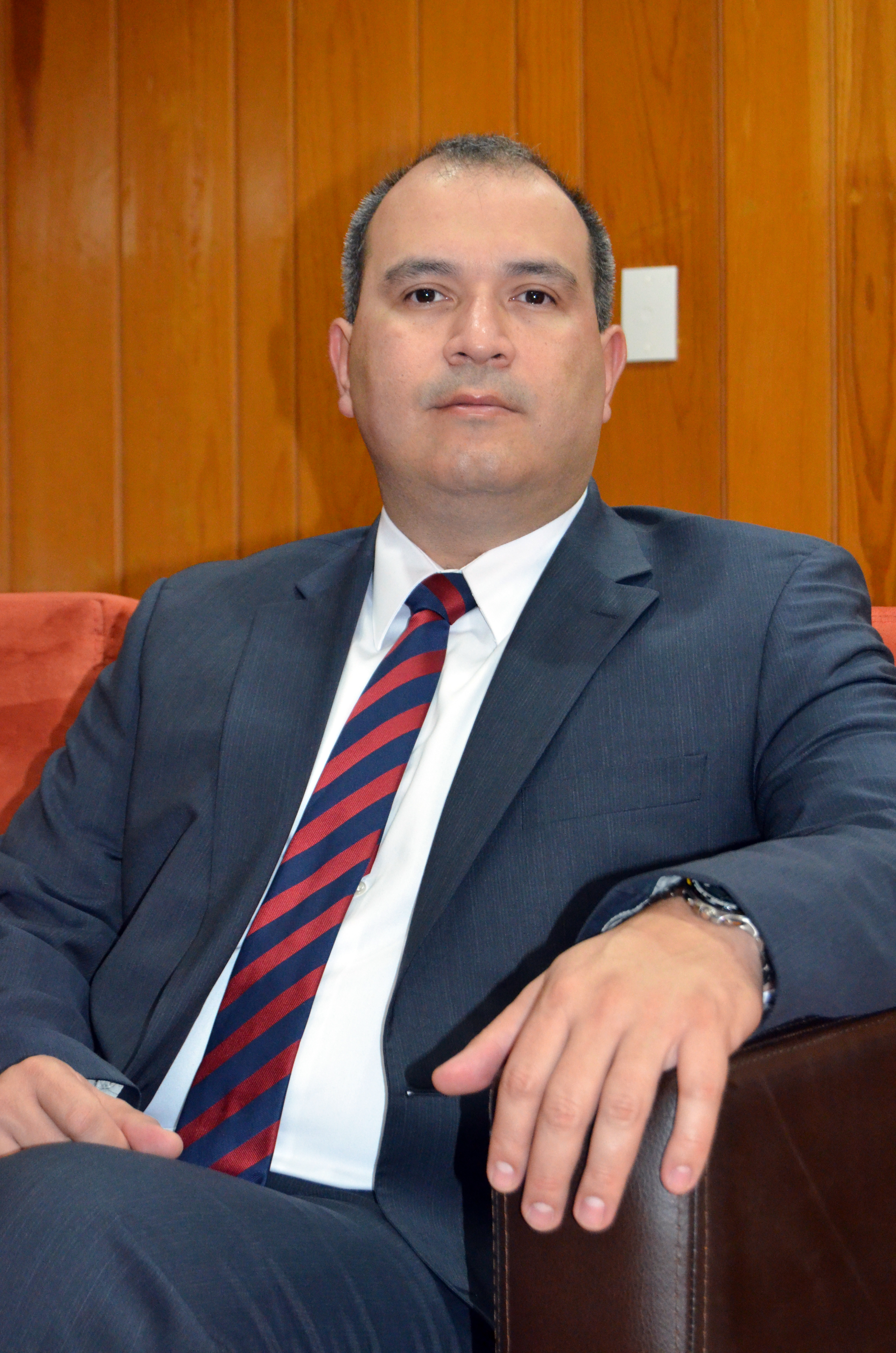 Carlos Treviño Medina